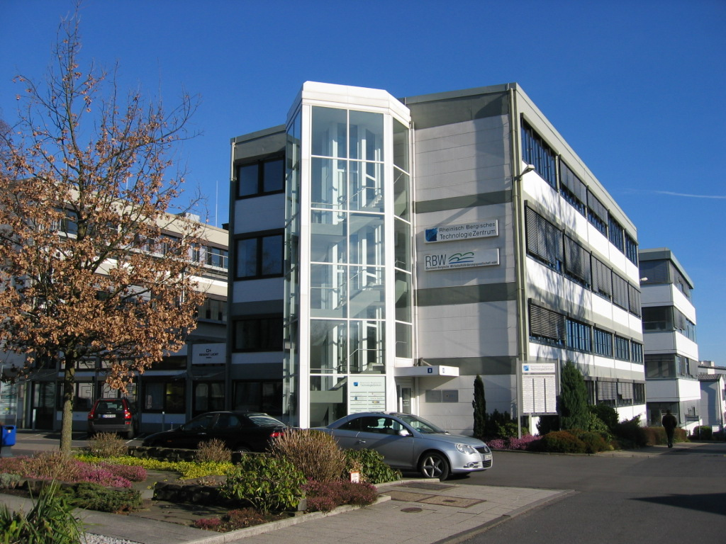 Stammhaus 08 im TechnologiePark Bergisch Gladbach